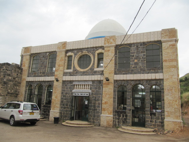 קבר רבי מאיר